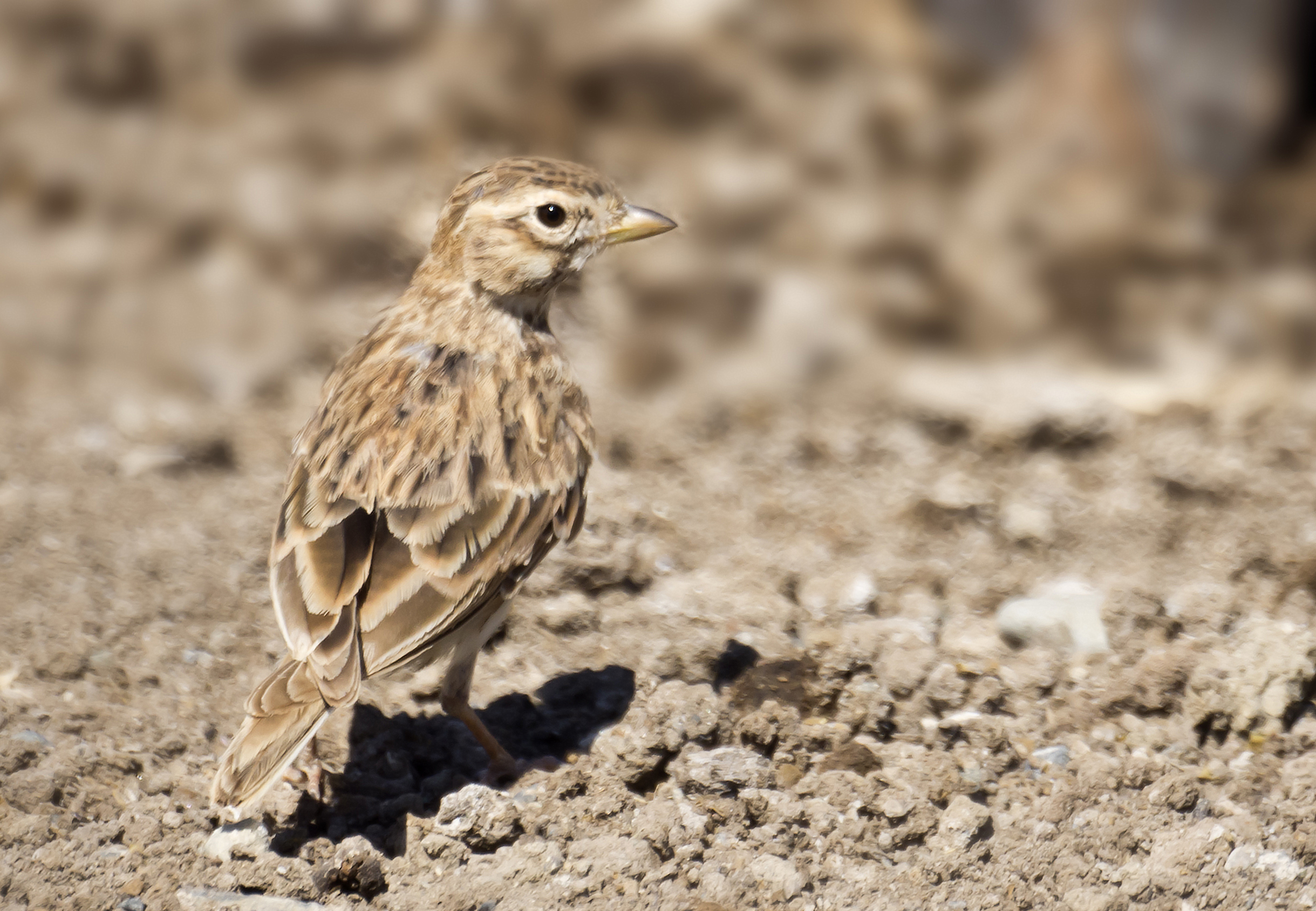 Terrera Marismeña, Calandrella rufescens